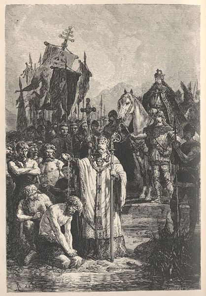 Iconographie d'après Alphonse-Marie-Adolphe de Neuville éditée dans le livre de François Pierre Guillaume Guizot "Histoire populaire de la France des premiers temps" de 1869.